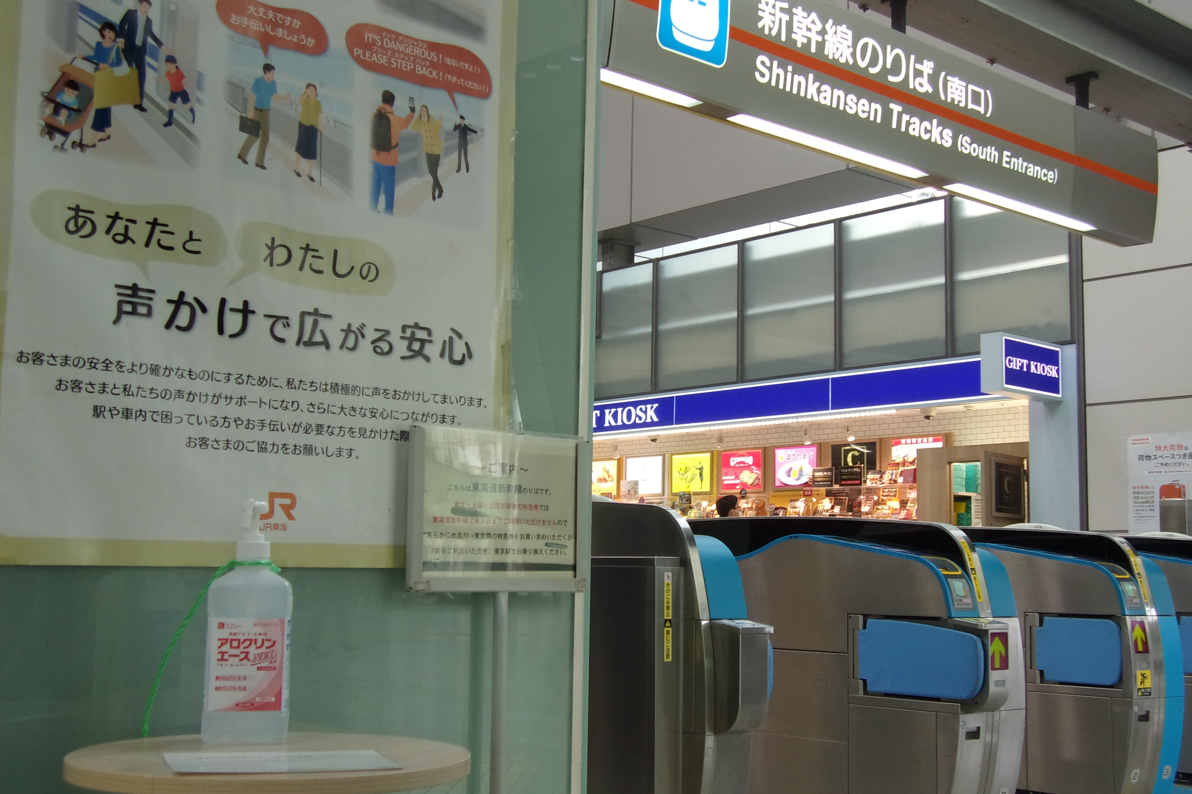 新型コロナウイルス感染防止のため、東海道新幹線品川駅自動券売機脇に設置された消毒液。券売機のタッチパネルは不特定多数の利用者が触れるため、チケット購入後に消毒を促している。